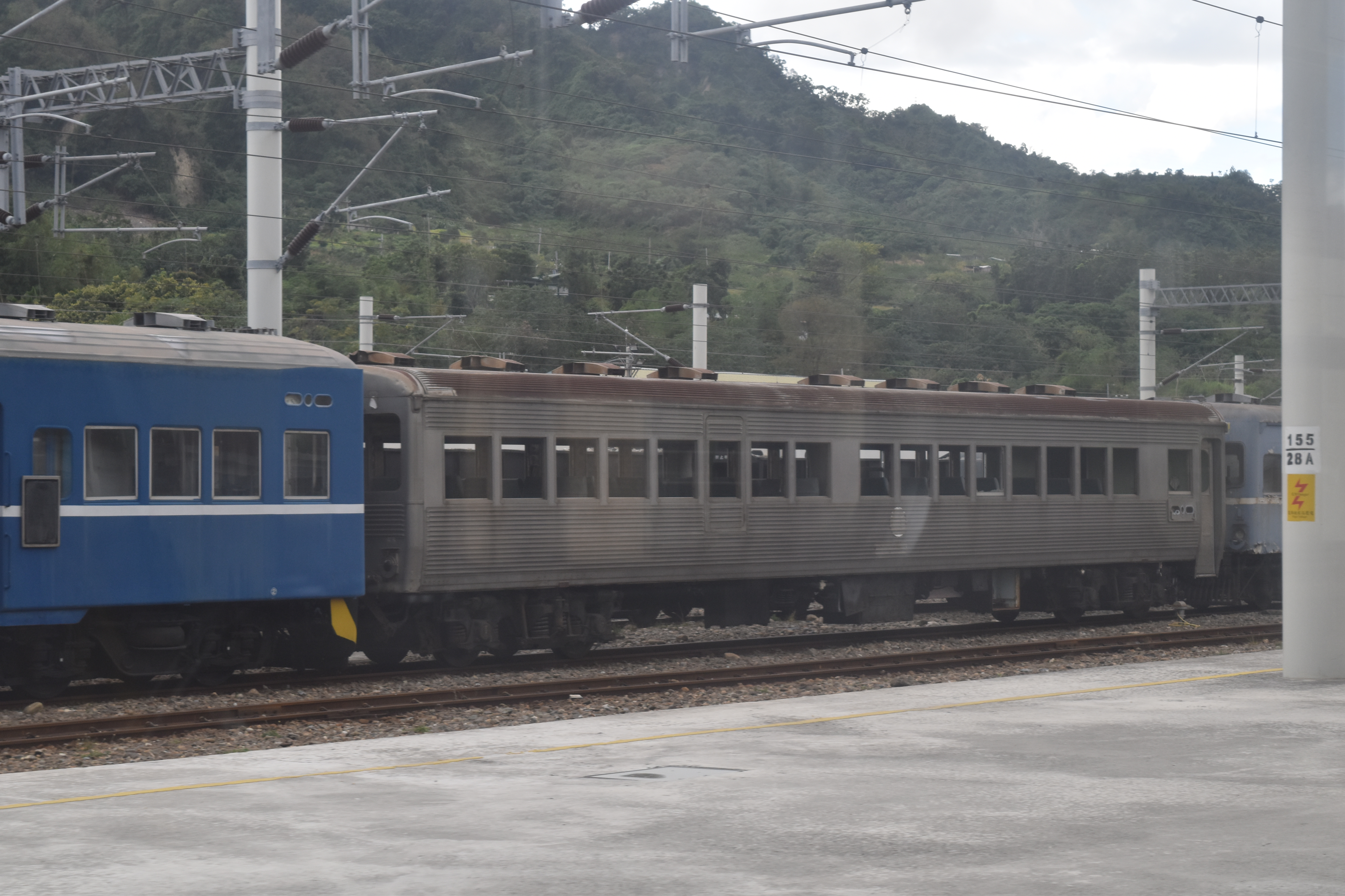 臺灣鐵路管理局臺東車站留置的DR2752，車號銘牌遺失。